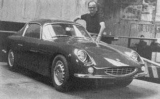 Bandini 1000 GT ed Ilario Bandini,1963 tratta dal libro Bandini